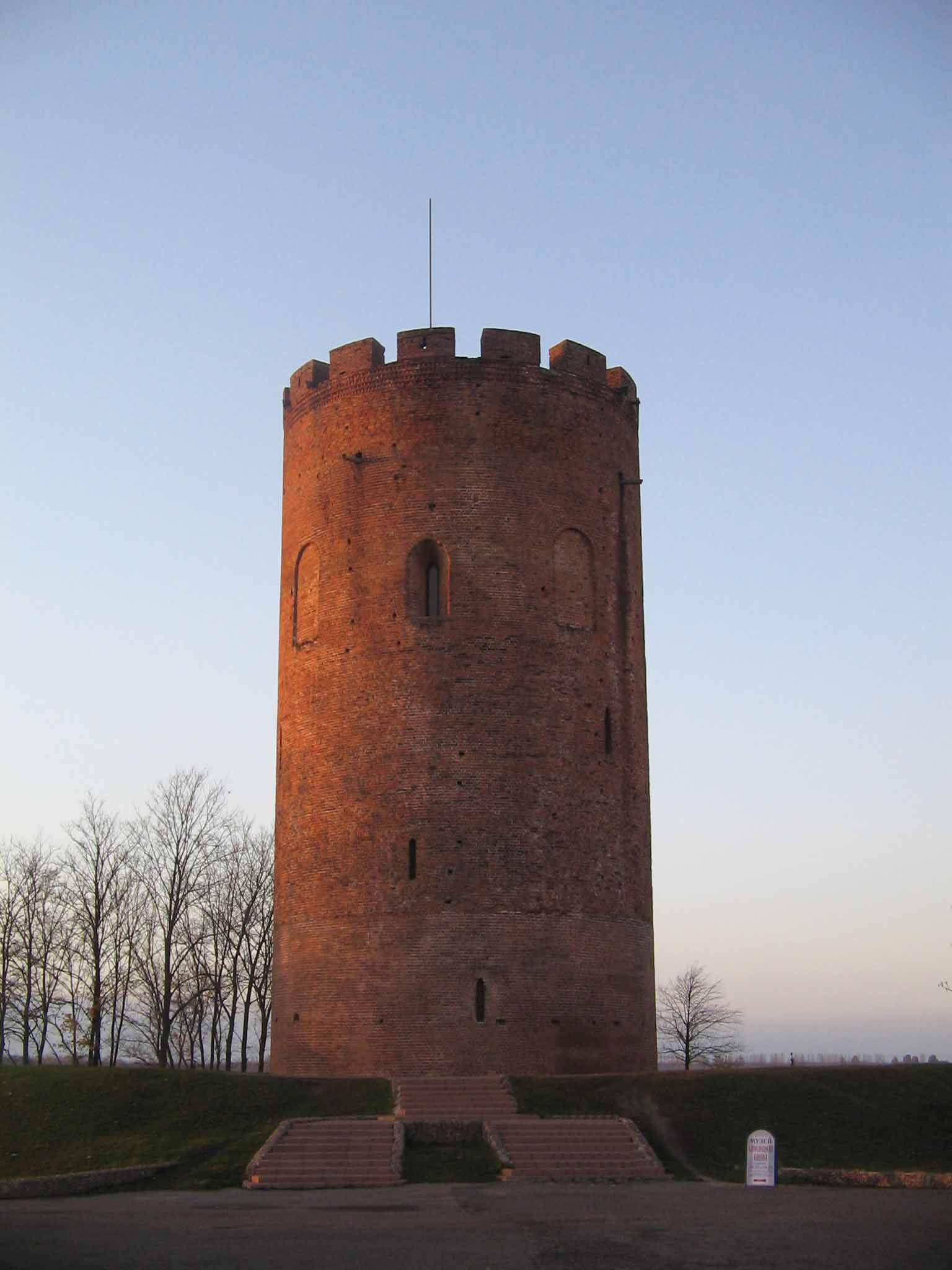 Tower, Kamyanets, Belarus